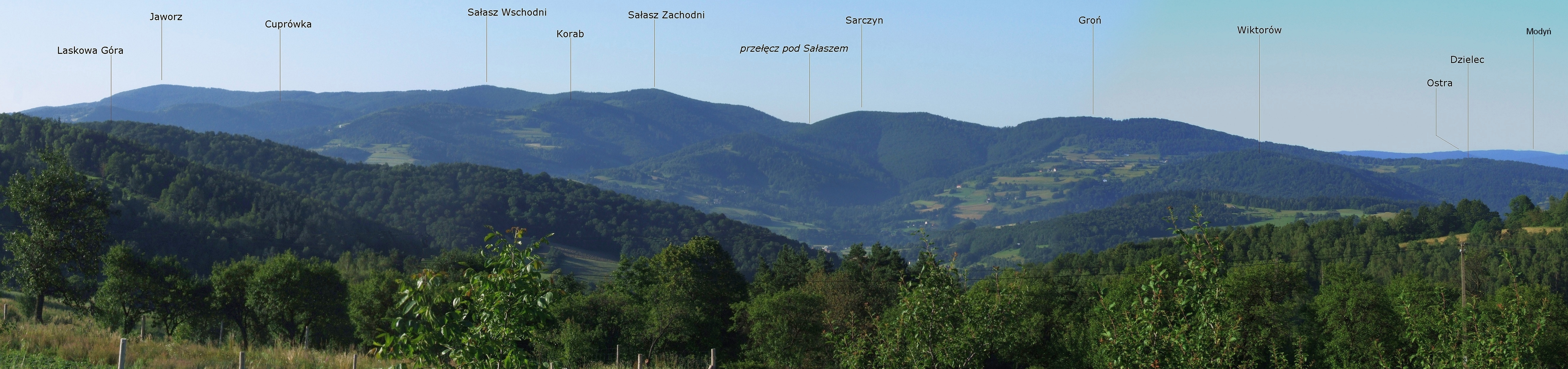 Widok z przełęczy Widoma